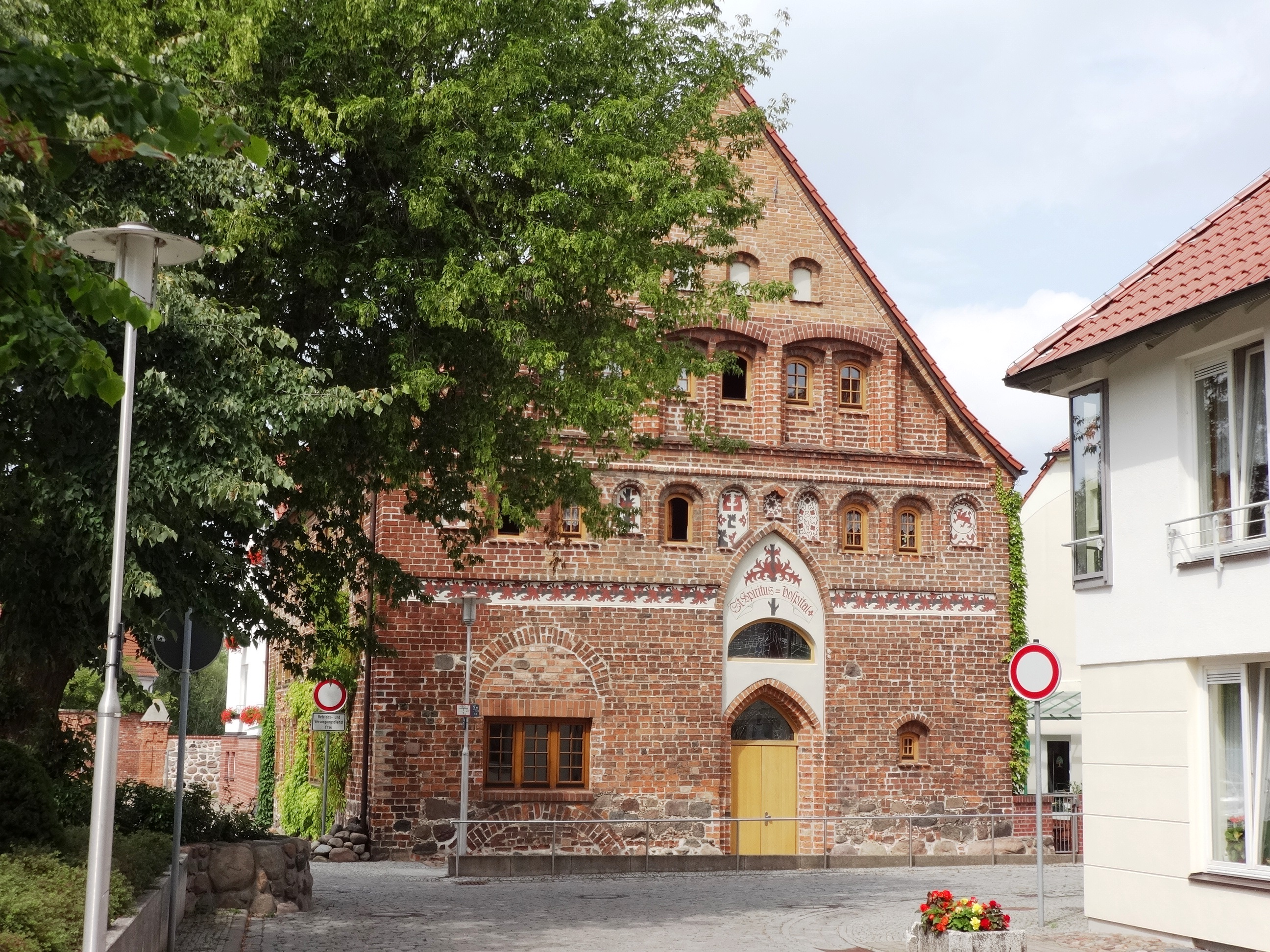 Backsteinbau aus dem 13. Jahrhundert, genutzt als Hospital, heute Altenheim. Eine Warmluftheizung aus dem 13. Jahrhundert ist nachgewiesen Pasewalk, Mecklenburg-Vorpommern